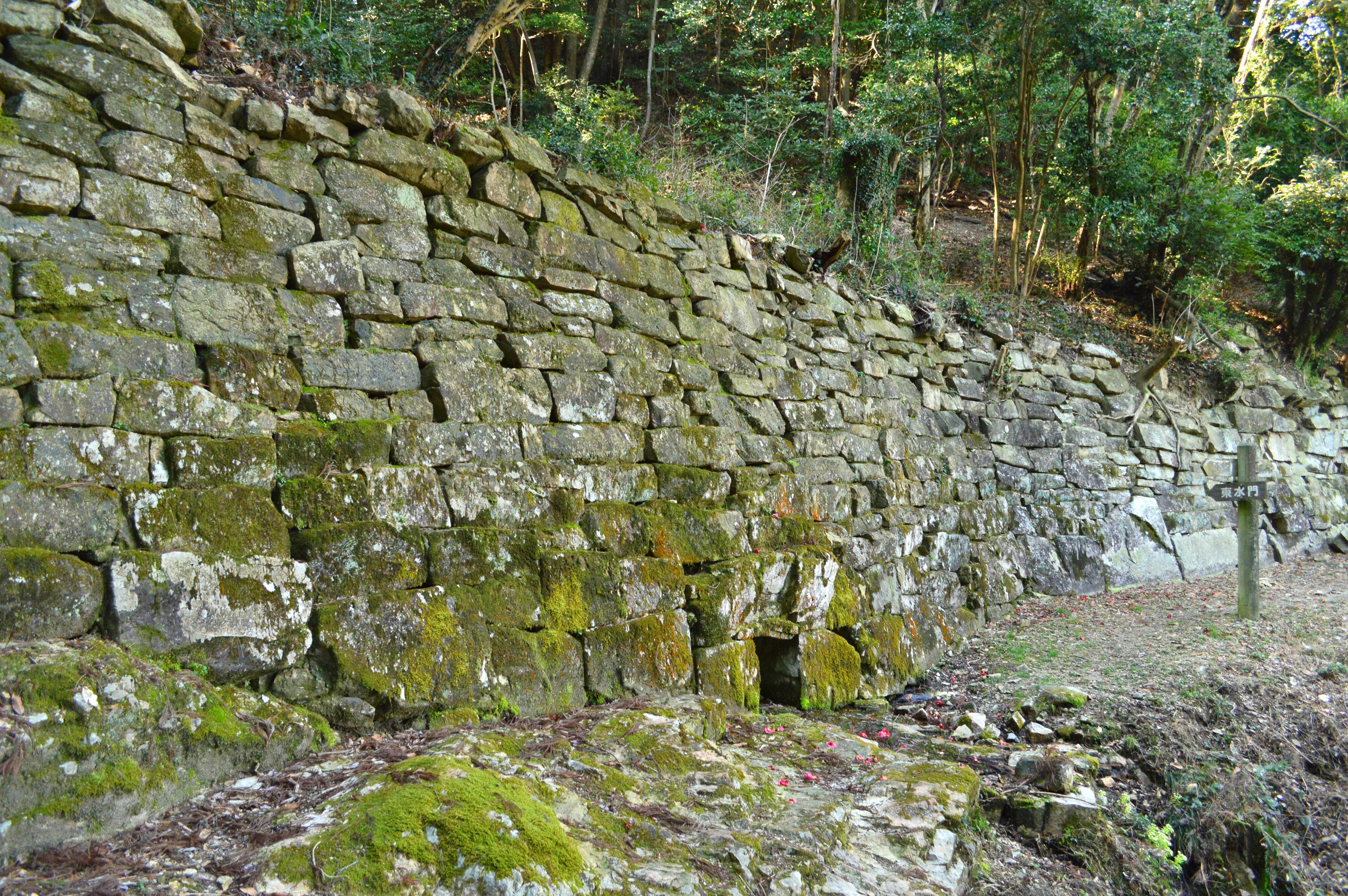 石城山神籠石 東水門